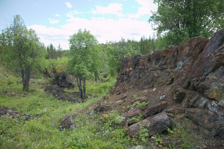 Brukslämningar. Motiv: Masugnsbyn i Tornefors Nyckelord: Riksintressen Kategori: Bruksmiljö Korrigerad motivbeskrivning: Gruvhål efter järnbrytning i Masugnsbyn, som ligger i Kiruna kommun, Jukkasjärvi socken.